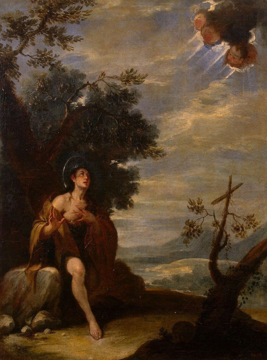 José Antolínez, María Magdalena en el desierto, óleo sobre lienzo, 89 x 62 cm. Museo del Hermitage.